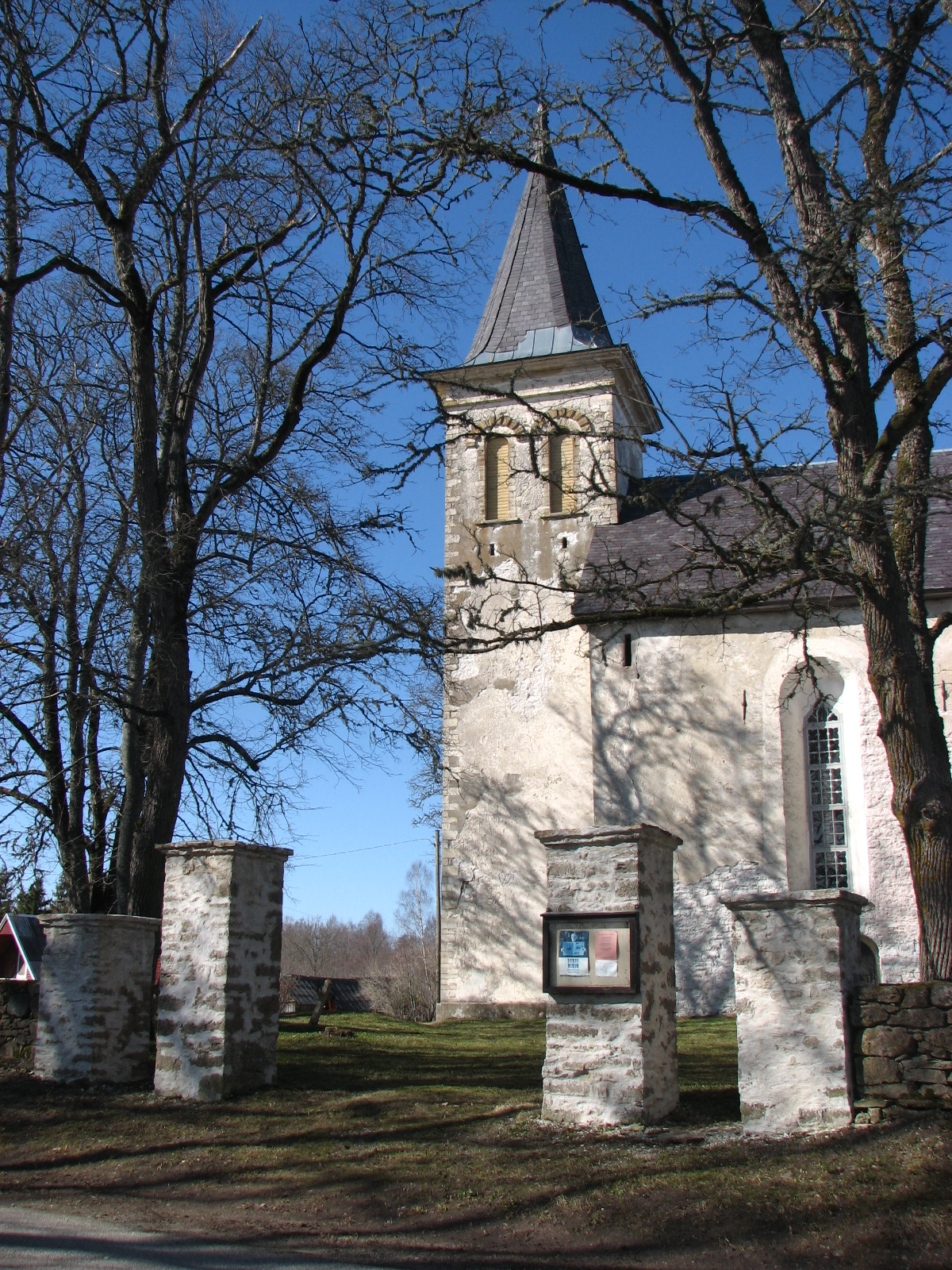 Hanila Pauluse kirik